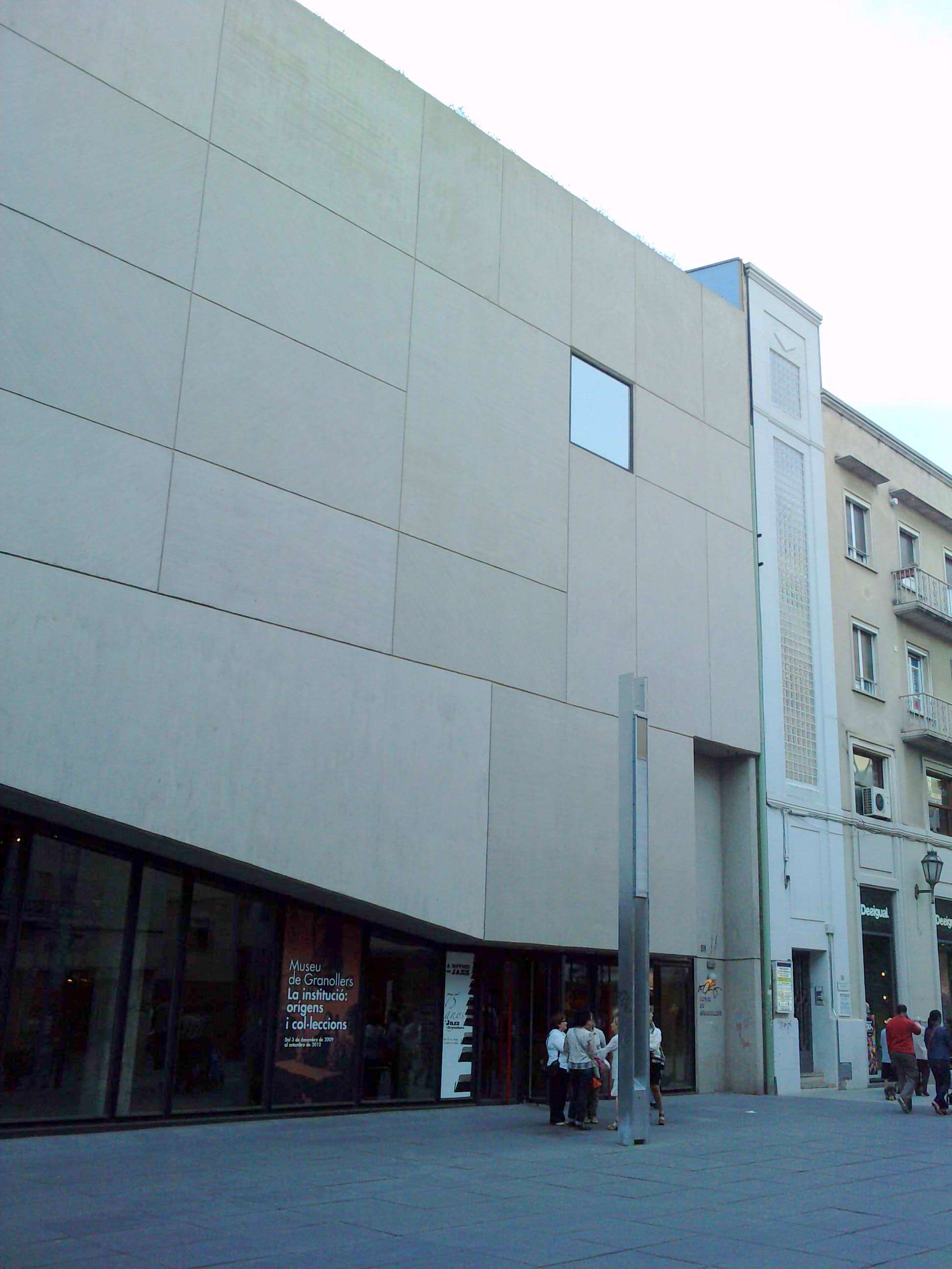 Museu de Granollers Granollers Museum Native nameMuseu de GranollersParent institutionBarcelona Provincial Council Local Museum Network LocationGranollers, provincia de Barcelona, (Spain)Coordinates41° 36′ 25.75″ N, 2° 17′ 19.05″ E Established1932Web page control : Q3816581 VIAF: 144843439 ISNI: 0000 0000 9785 5187 LCCN: n99253550 BIC: RI-51-0001324 GND: 5154670-X WorldCat institution QS:P195,Q3816581